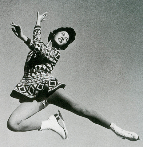 Junko Hiramatsu